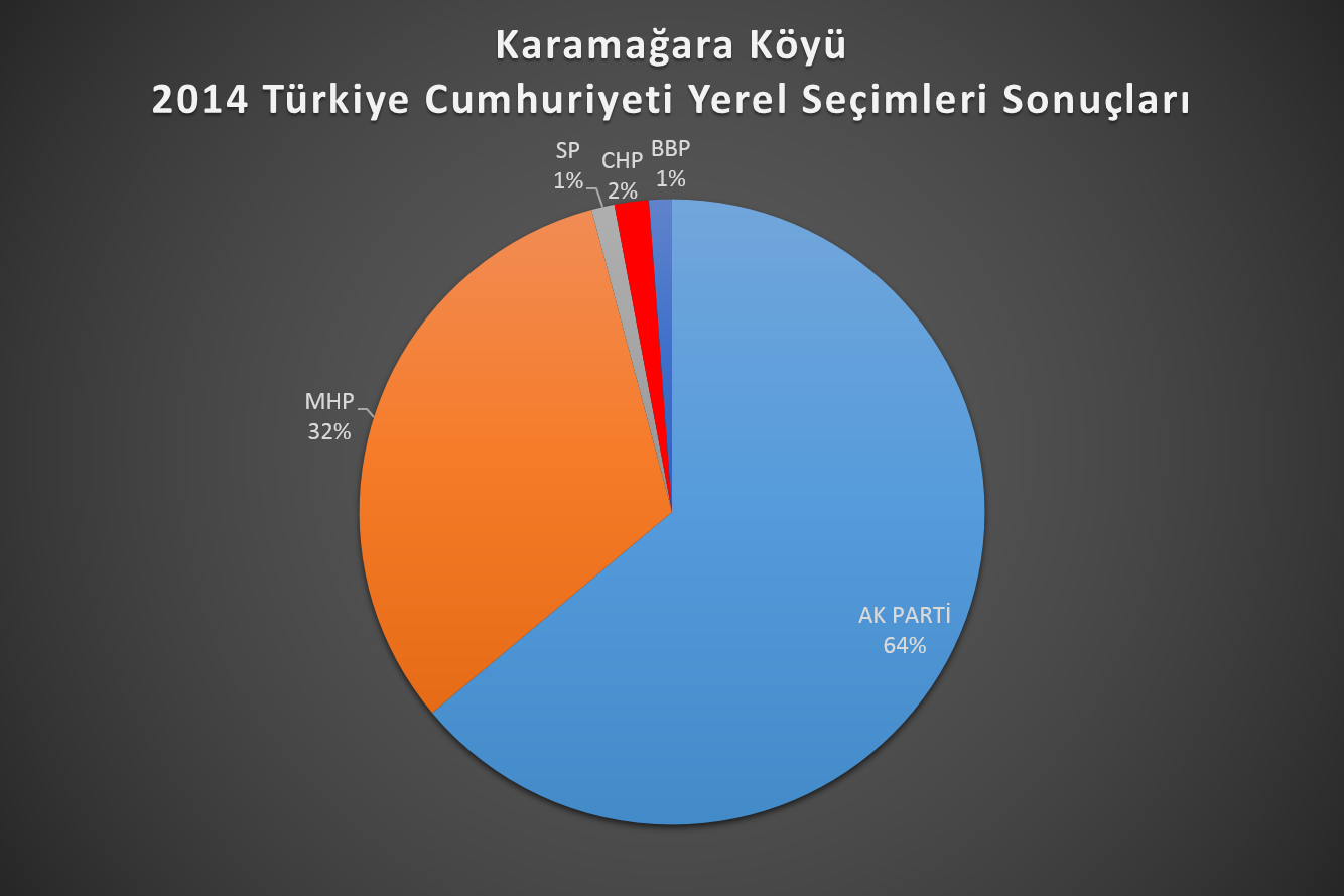 Kahramanmaraş iline bağlı Elbistan ilçesindeki Karamağara Köyü'nün Seçim Sonuçları Buradaki verilere sadık kalınarak hazırlanmıştır!